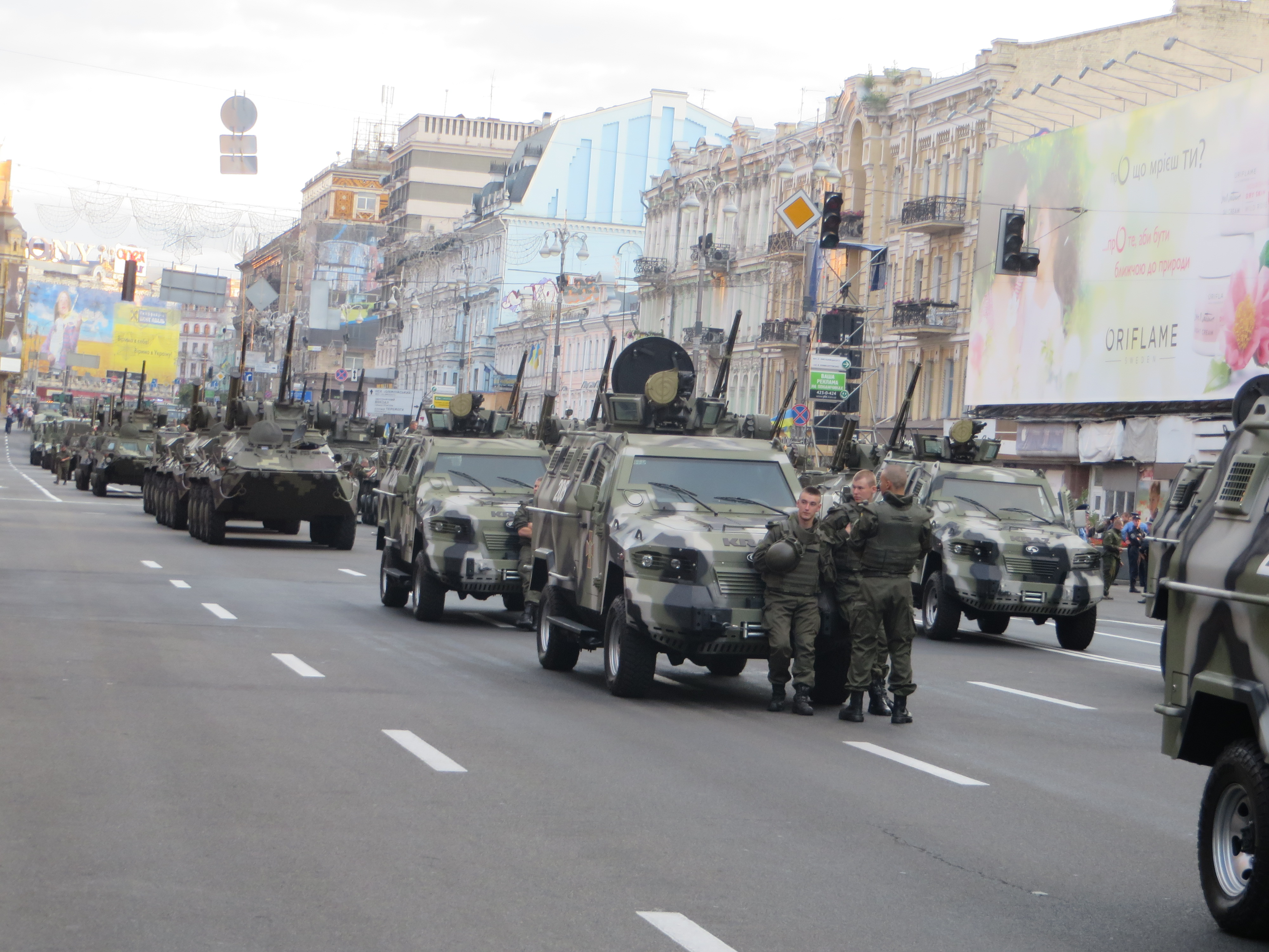 Українські броньовики KRAZ Cougar під час тренувального маршу перед парадом на День незалежності, 22 серпня 2014 року, Київ, Україна.